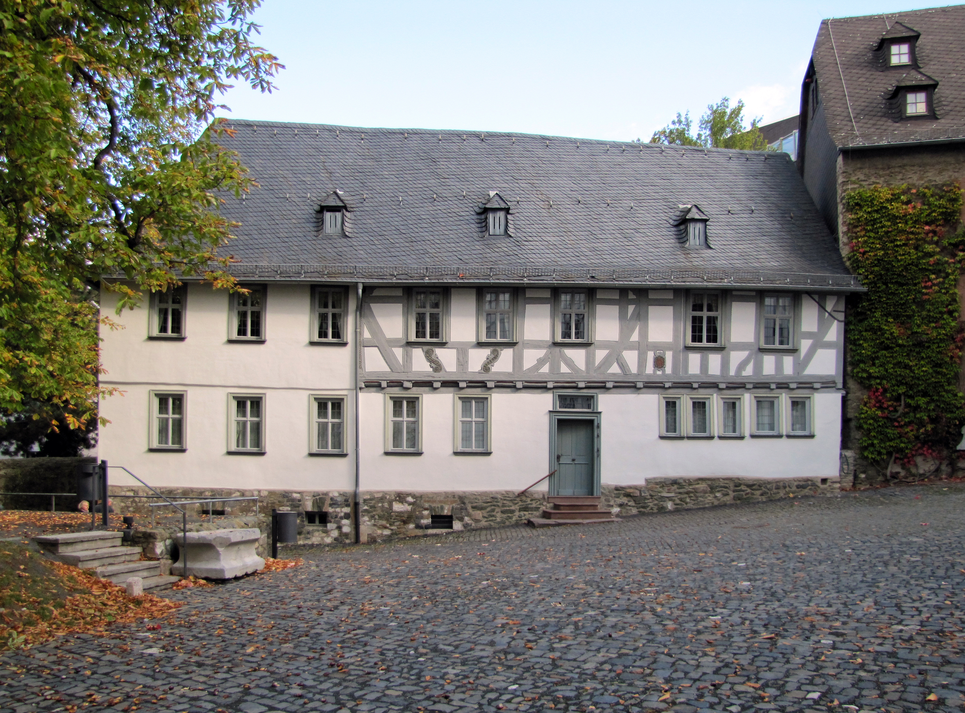 Das Geburts- und erste Wohnhaus der Charlotte Buff in Wetzlar. Heute ein Museum.